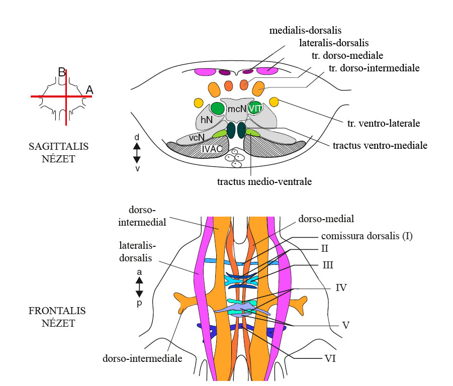 idegdúcok, komissurák